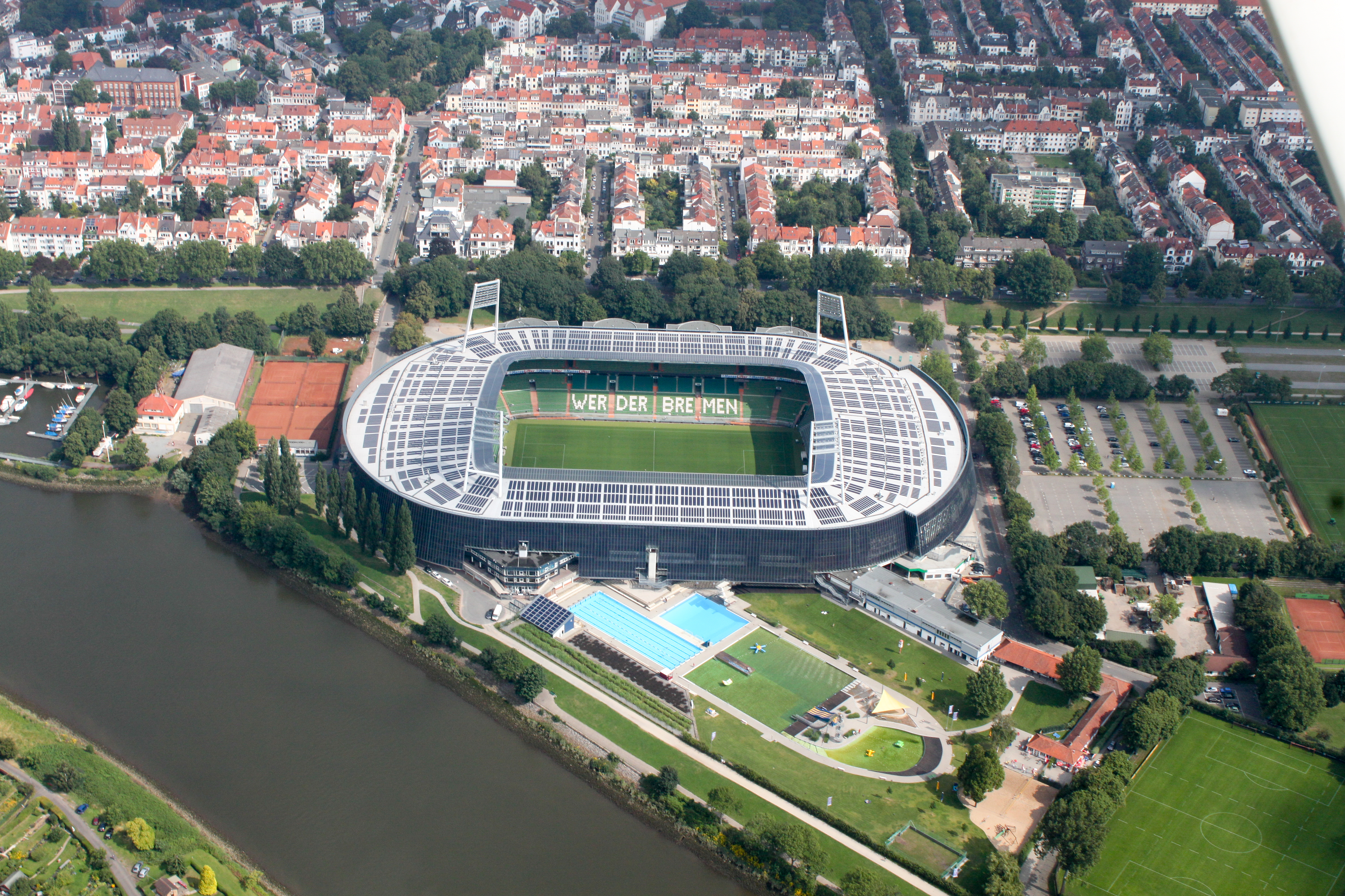 Lufbilder Bremen: Weser-Stadion, Peterswerder, Östliche Vorstadt, Steintor, Bahnhofsvorstadt, Hauptbahnhof, Findorff-Bürgerweide, Bürgerweide, Parkhotel (identische Bildbeschreibung für File:2012-08-08-fotoflug-bremen zweiter flug 0407.JPG bis File:2012-08-08-fotoflug-bremen zweiter flug 0508.JPG; alle mit GPS-Koordinaten